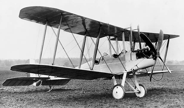 RAF BE.2c